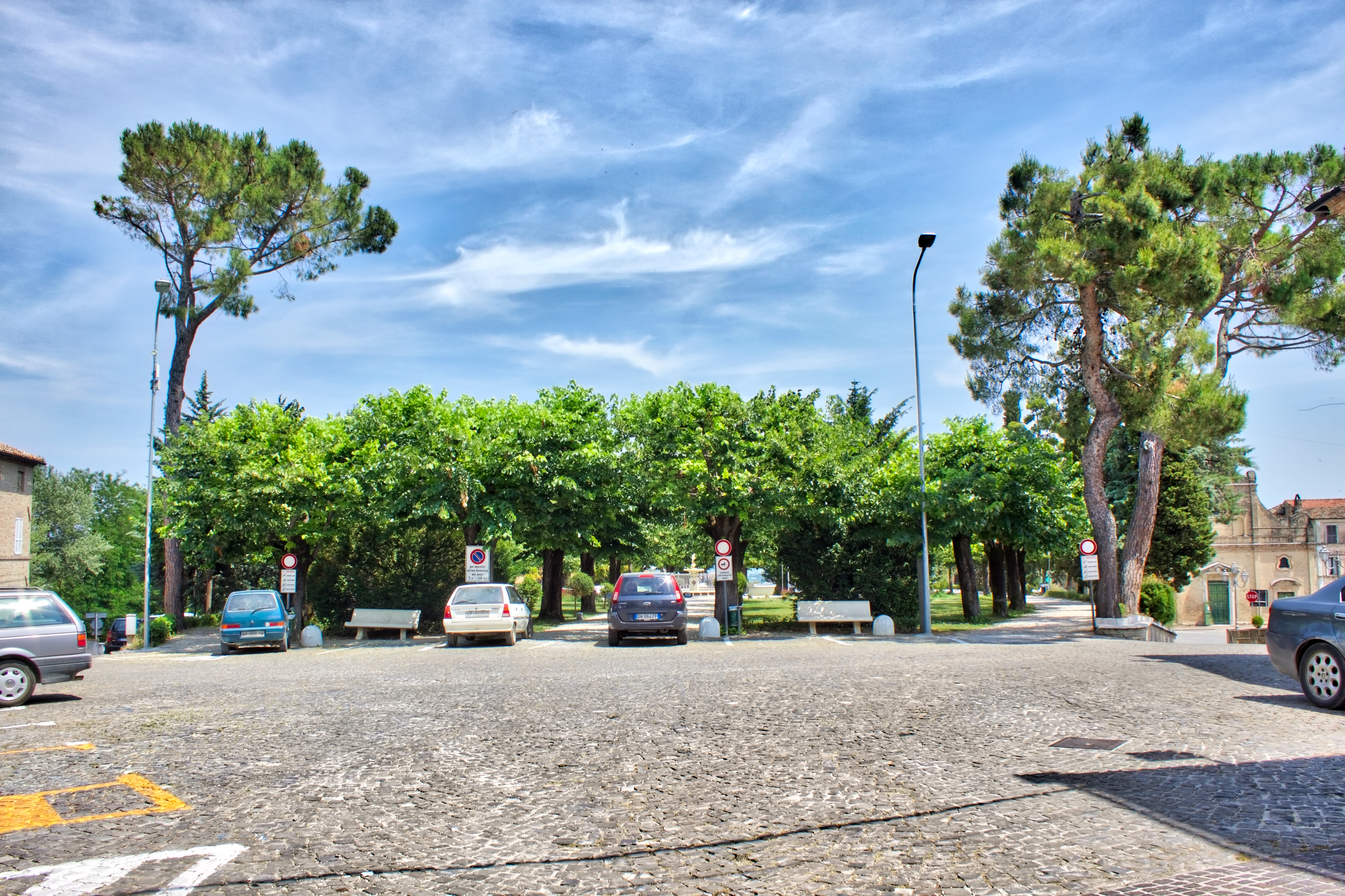 L'ingresso dei Giardini Pubblici su piazza Leopardi